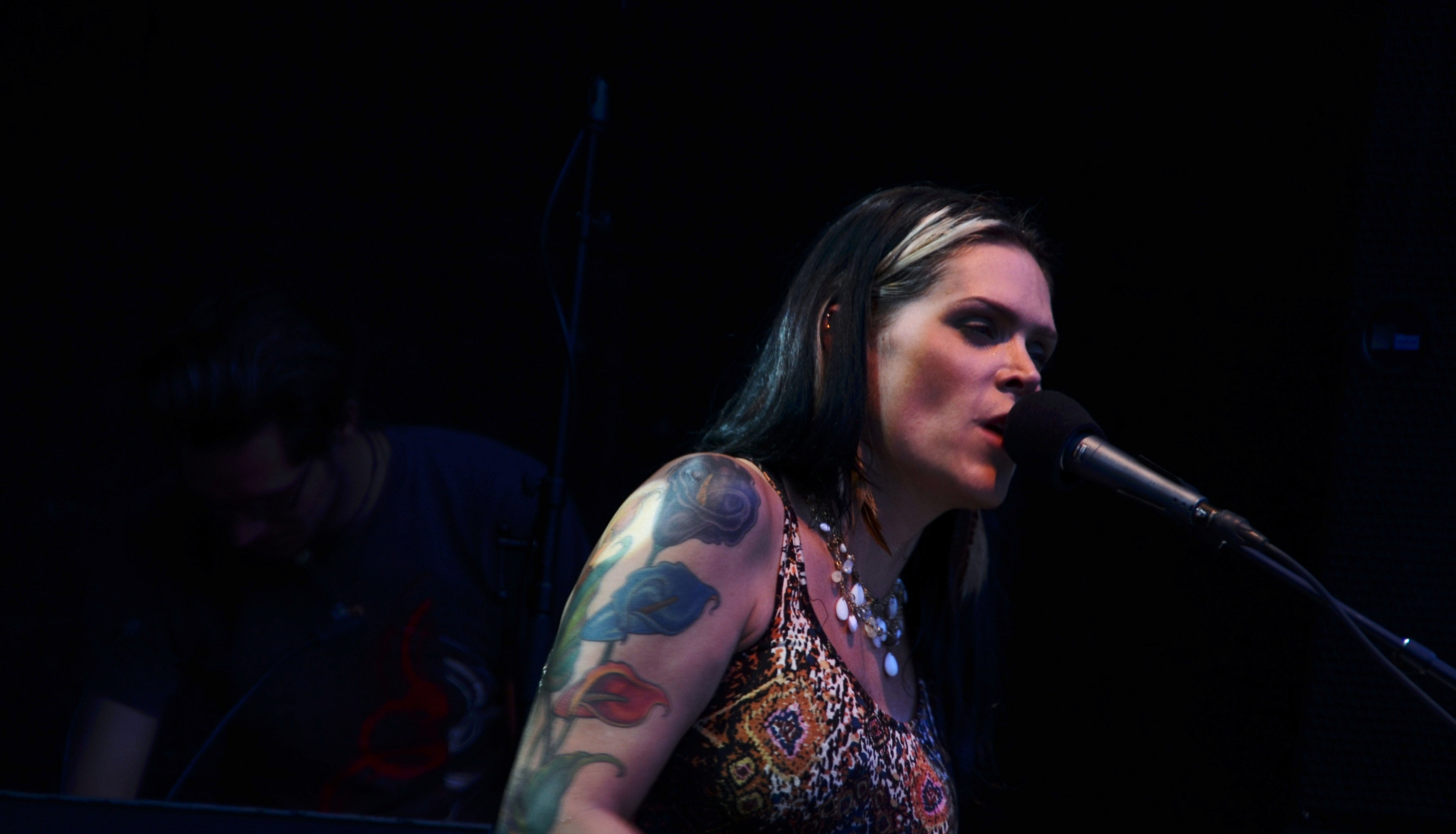 Blues Singer Beth Hart